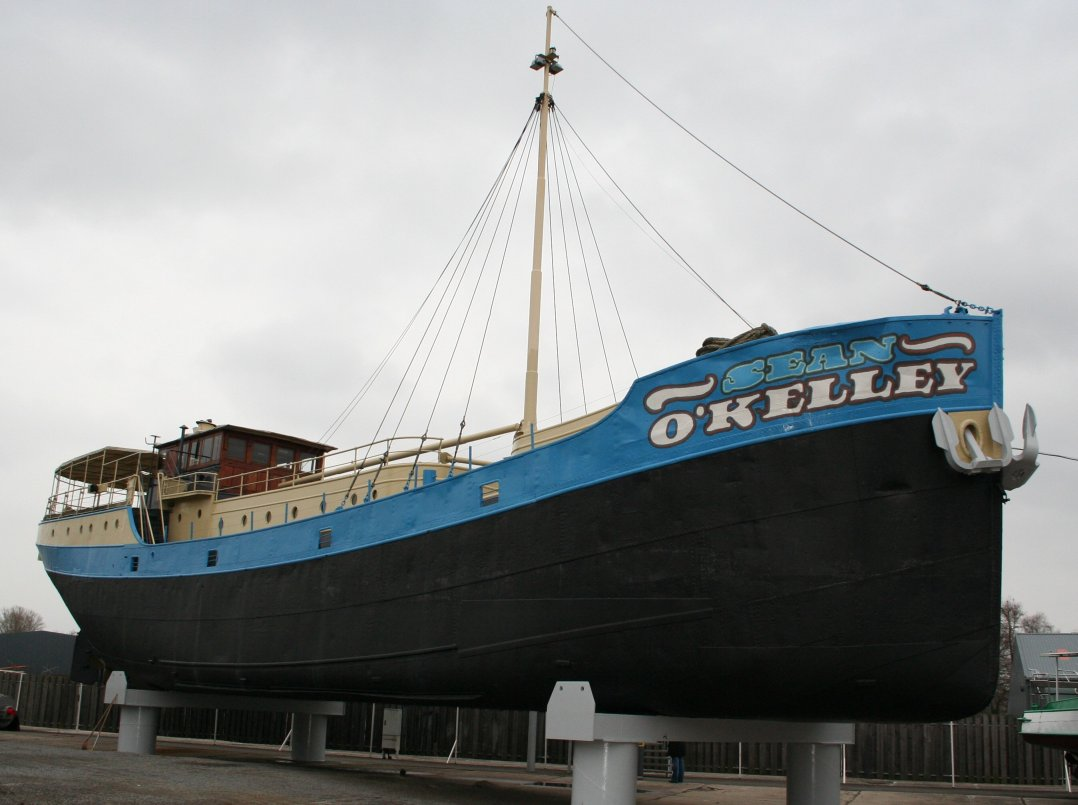 Das ehemalige Hausboot der Kelly Family, ein Antik-Coaster Baujahr 1923 mit 34 Meter Länge, seit Juni 2004 ausgestellt im Technik-Museum Speyer